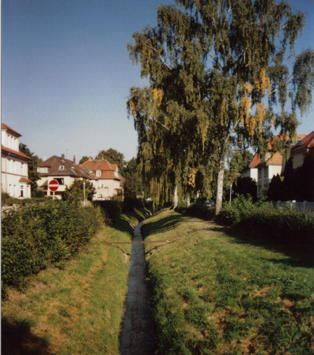 Küchenthalstraße, Weststadt (Hildesheim)